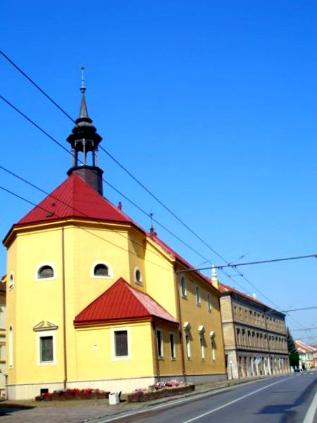 Prešov evanjelický kostol